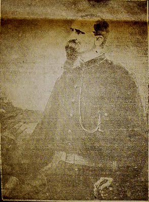 Gral Leandro Gomez, heroe de la defensa de Paysandu